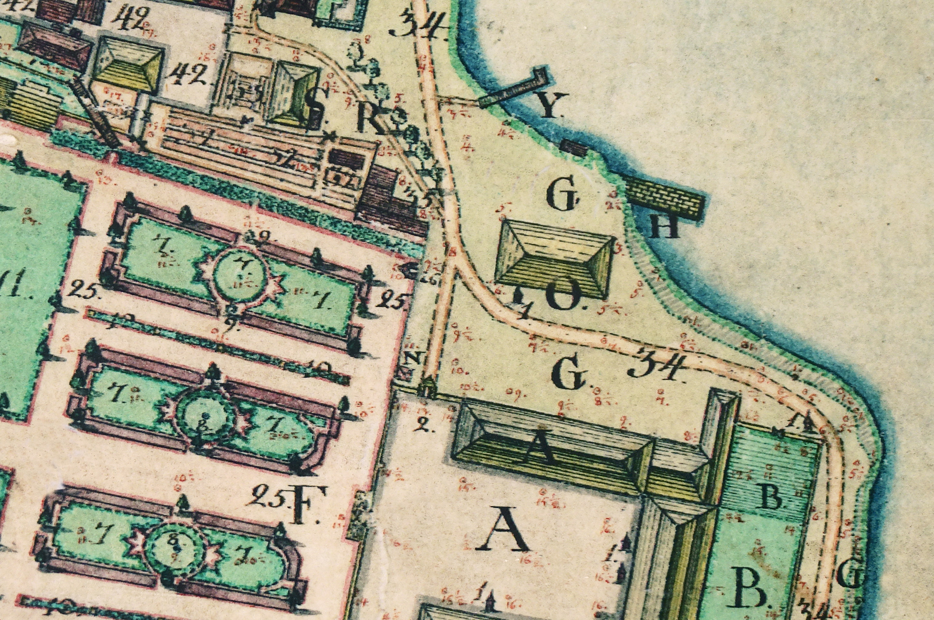 Del av karta över Ulriksdals slott med köksbyggnaden (O) och stenbryggan (H)